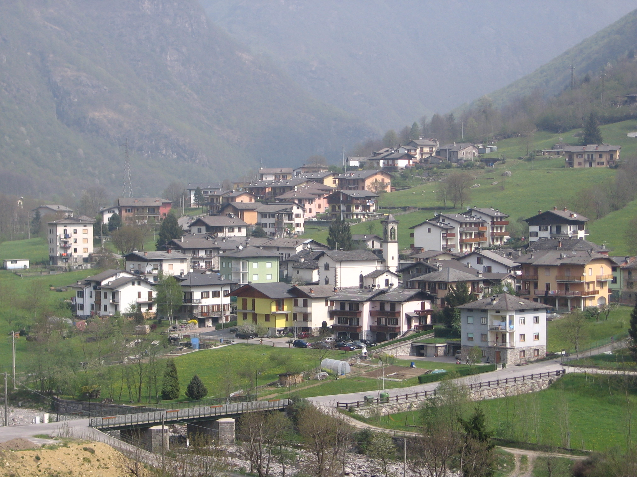 Gandellino, fraz. Gomo S.Marino, Bergamo, Italia